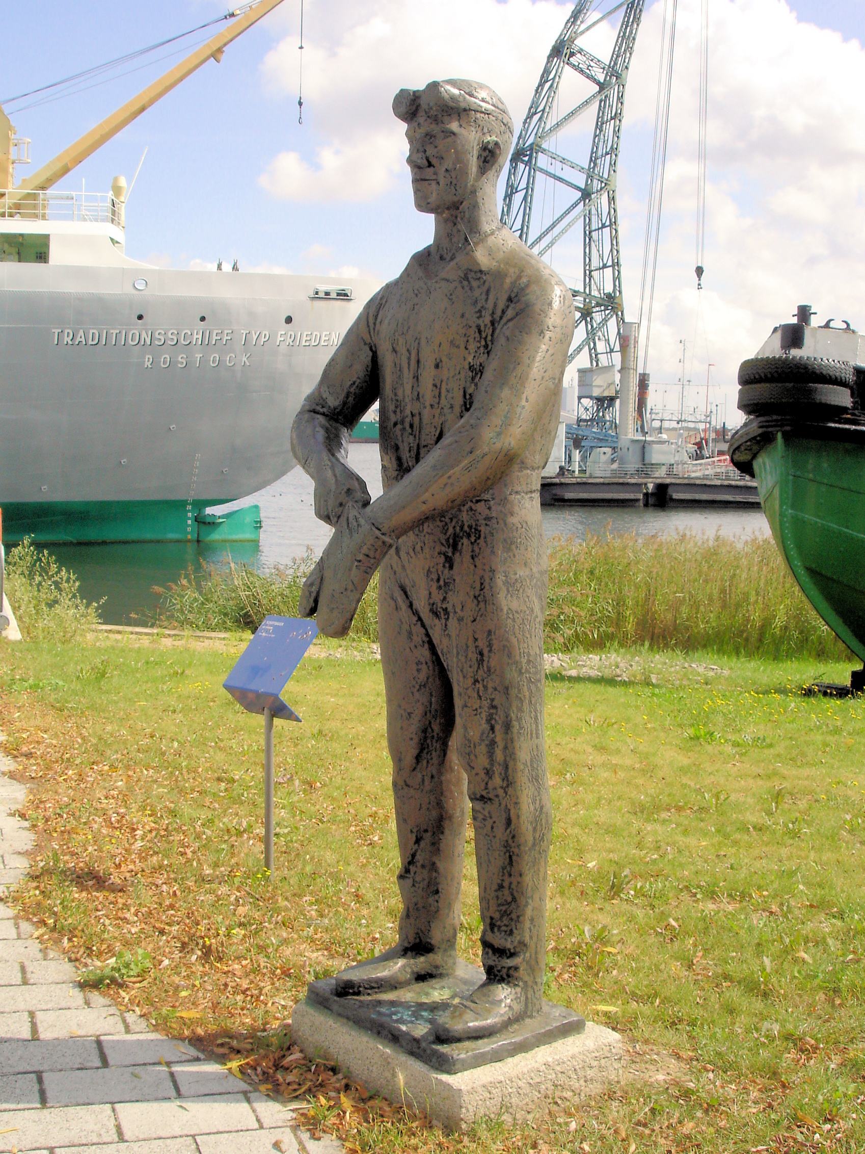 Bronzeskulptur Schweißer von Jo Jastram (1970) am Traditionsschiff in Schmarl (Rostock)